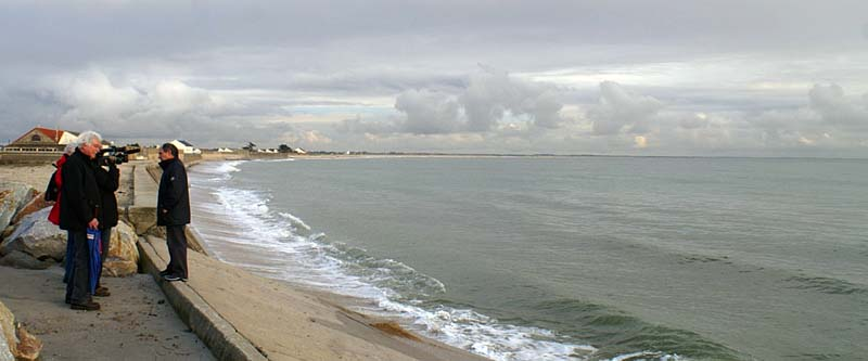 Interview par ARTE d'André Berthou, président du Collectif le peuple des dunes, sur la digue de la presqu'île de Gâvres dans le Morbihan en Bretagne. A l'horizon le site envisagé pour l'exploitation de sable marin.